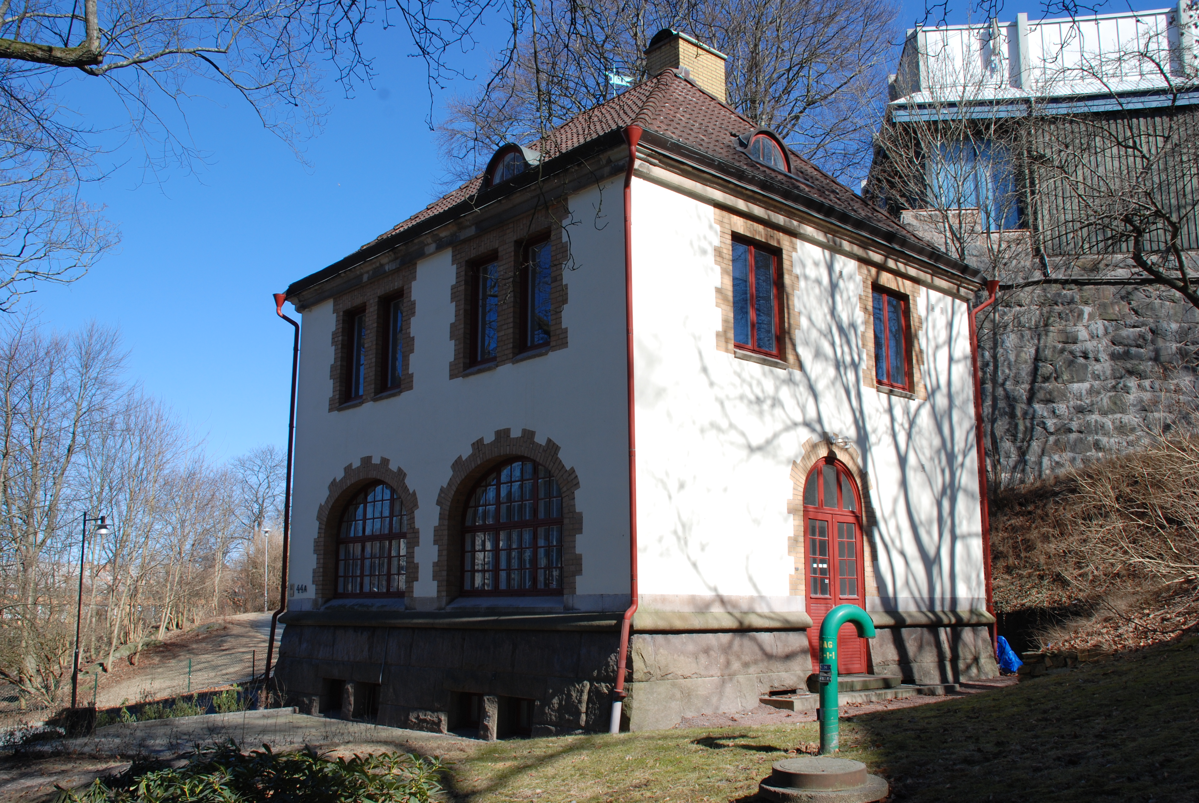 Det gamla pumphuset invid tidigare vattenreservoaren, Södra Viktoriagatan 44A i Göteborg, intill Fjäderborgen i Landala.